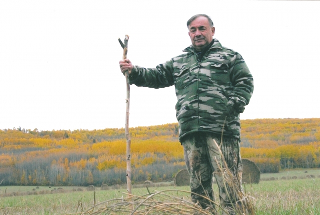 Antanas Trumpa medžioklė Kanadoje